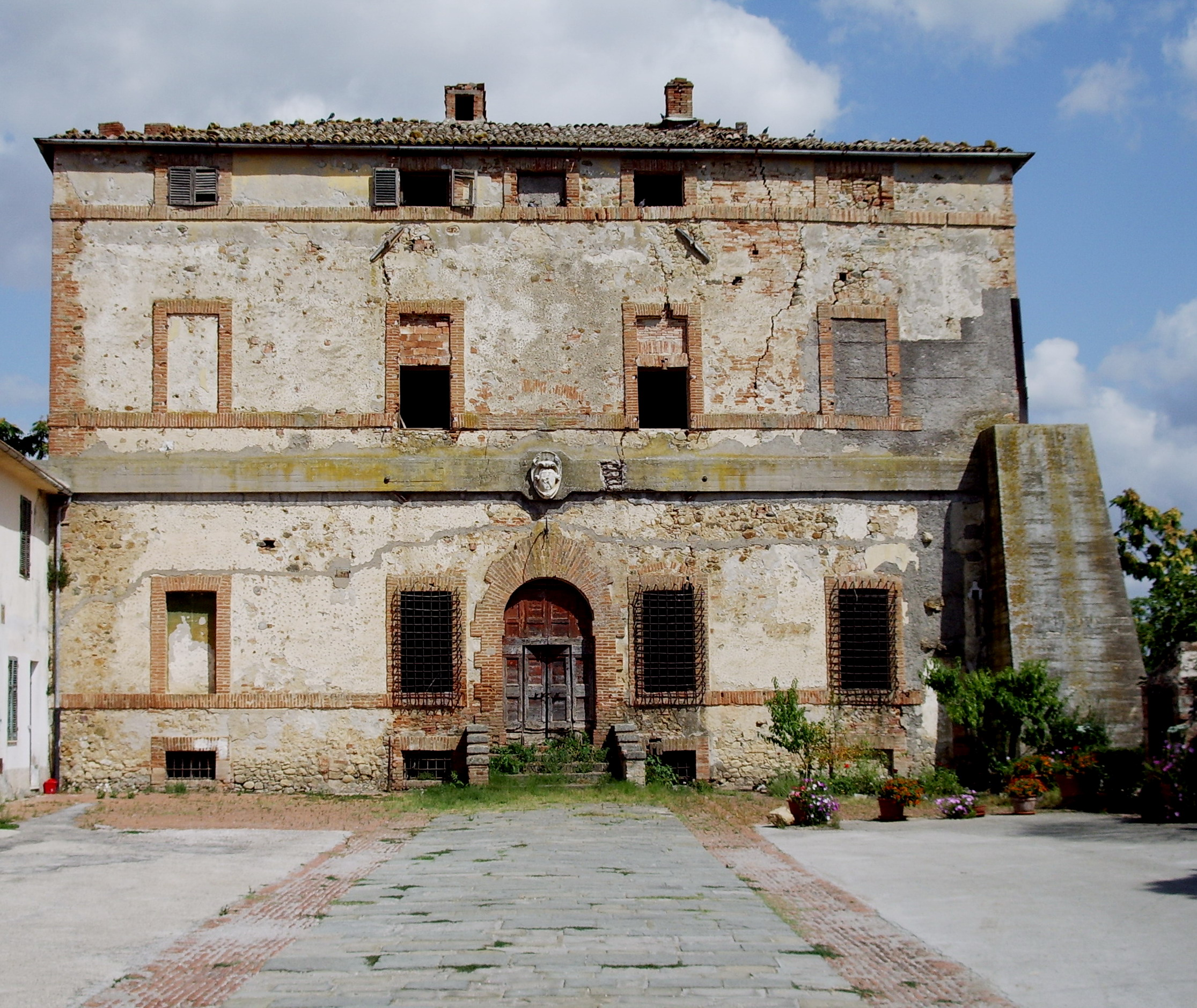 La Fattoria di Pomonte presso Scansano (GR), antica Villa Sforzesca, fotografata il 18/08/2006